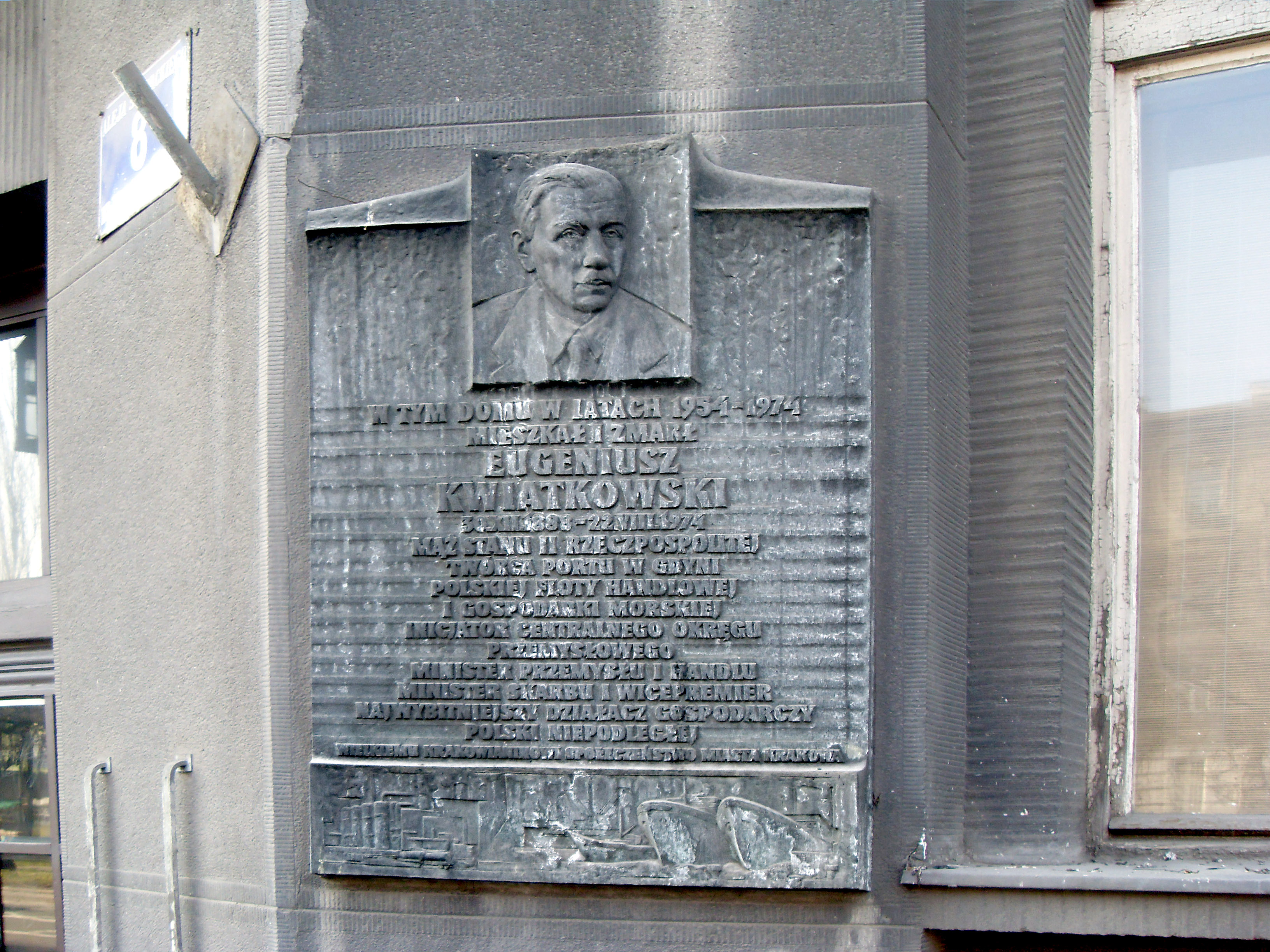 Tablica na kamienicy, w której w latach 1954-1974 mieszkał Eugeniusz Kwiatkowski. Kraków